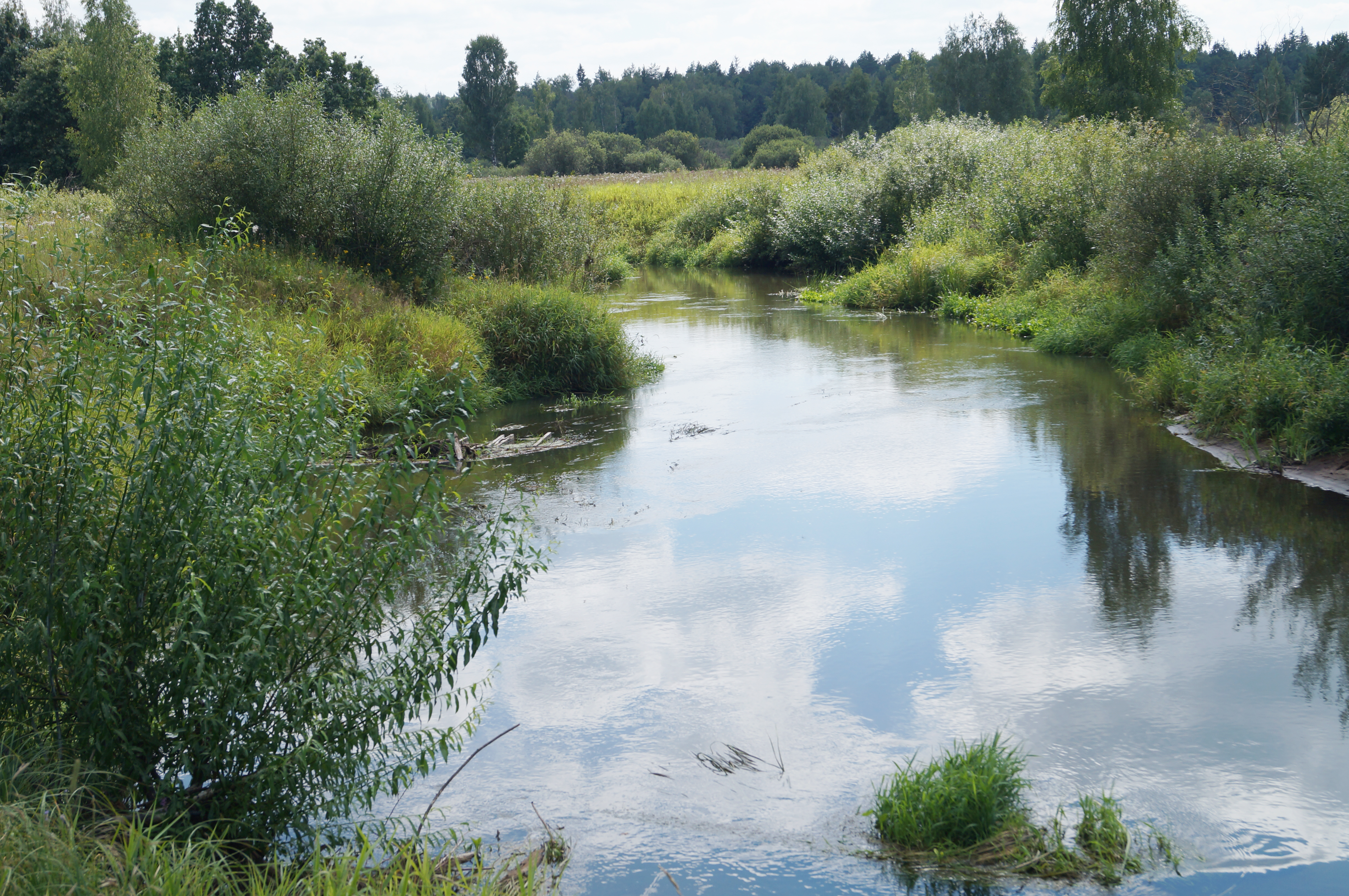 Река Жиздра за д. Поляки (Думиничский район)